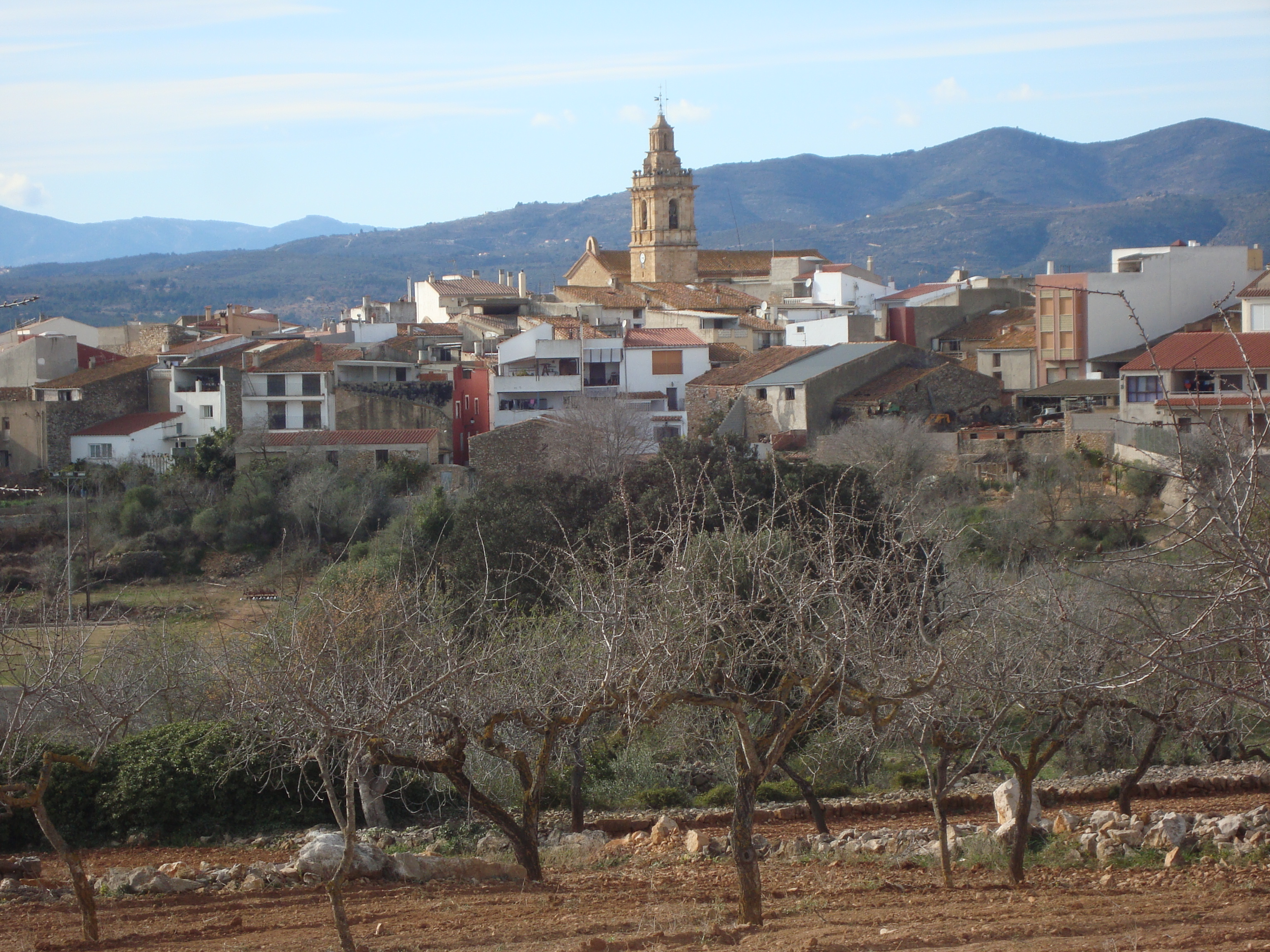 Panorámica de Vilanova d'Alcolea